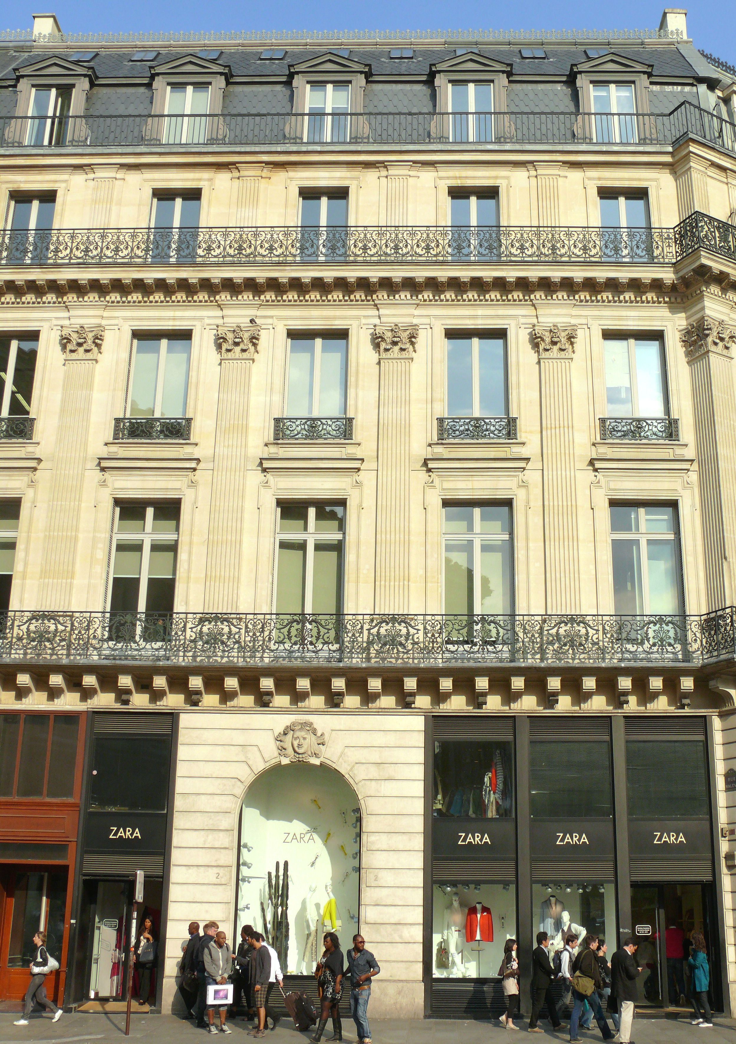 Paris 9ème arrondissement - Rue Halévy - Elévation type de la façade prévue dans le décret de 1860